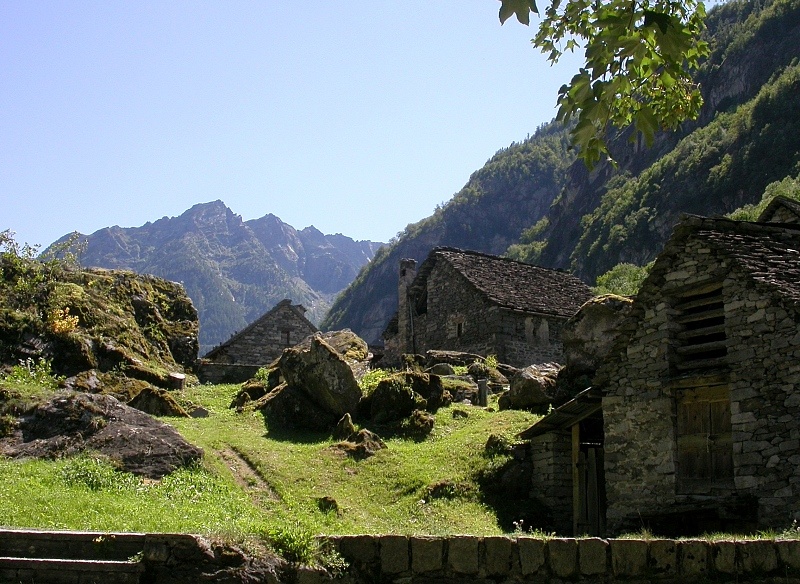 Valle Maggia, Ticino, Switzerland